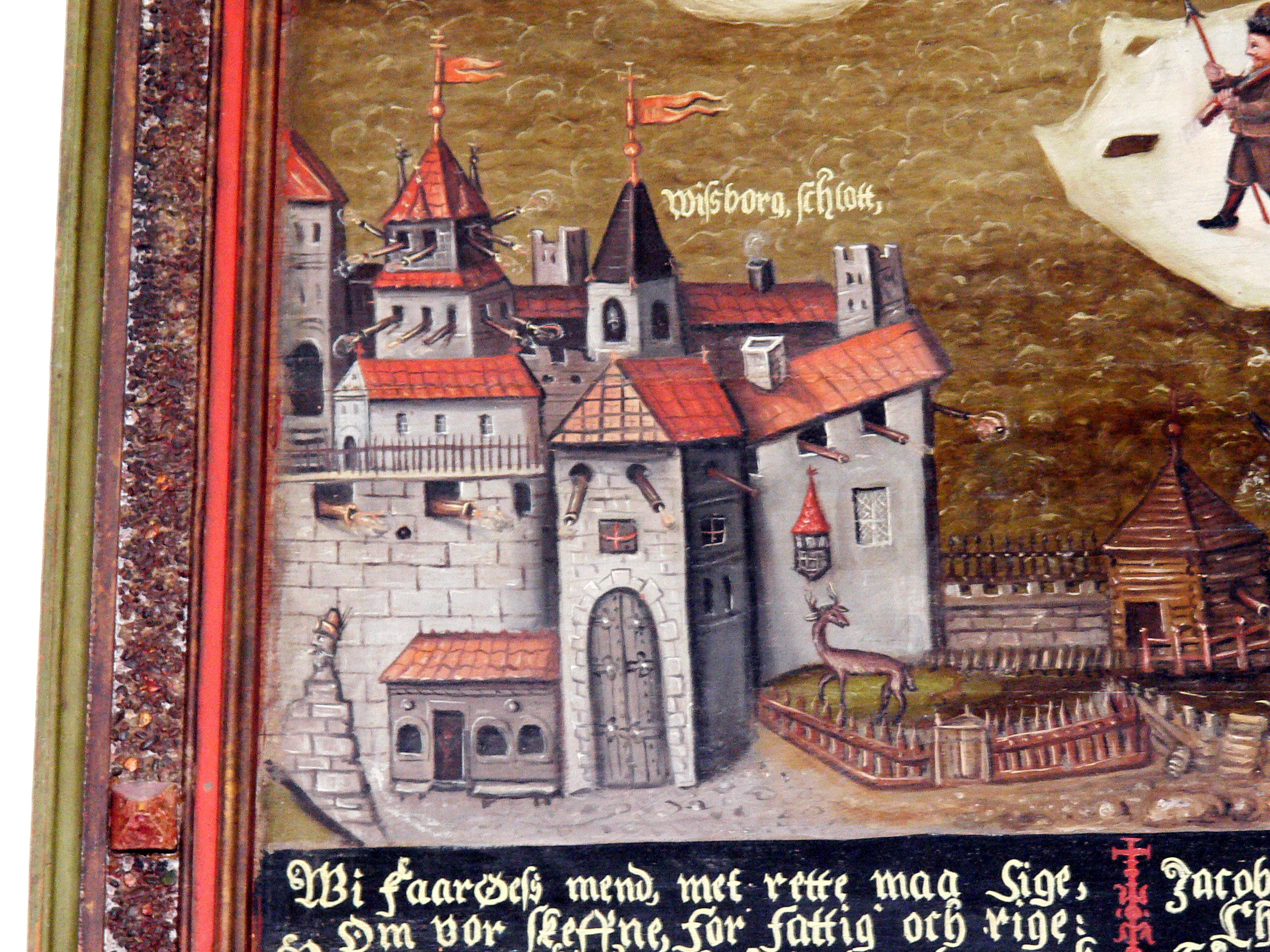 Farö kyrka auf Farö. Votivbild ( 1618 ) Ausschnitt: Schloss Wisborg in Visby.